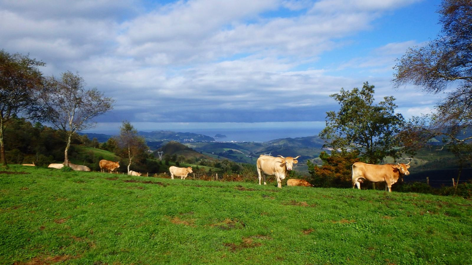 Ezkeltzu mendiaren tontorrean.